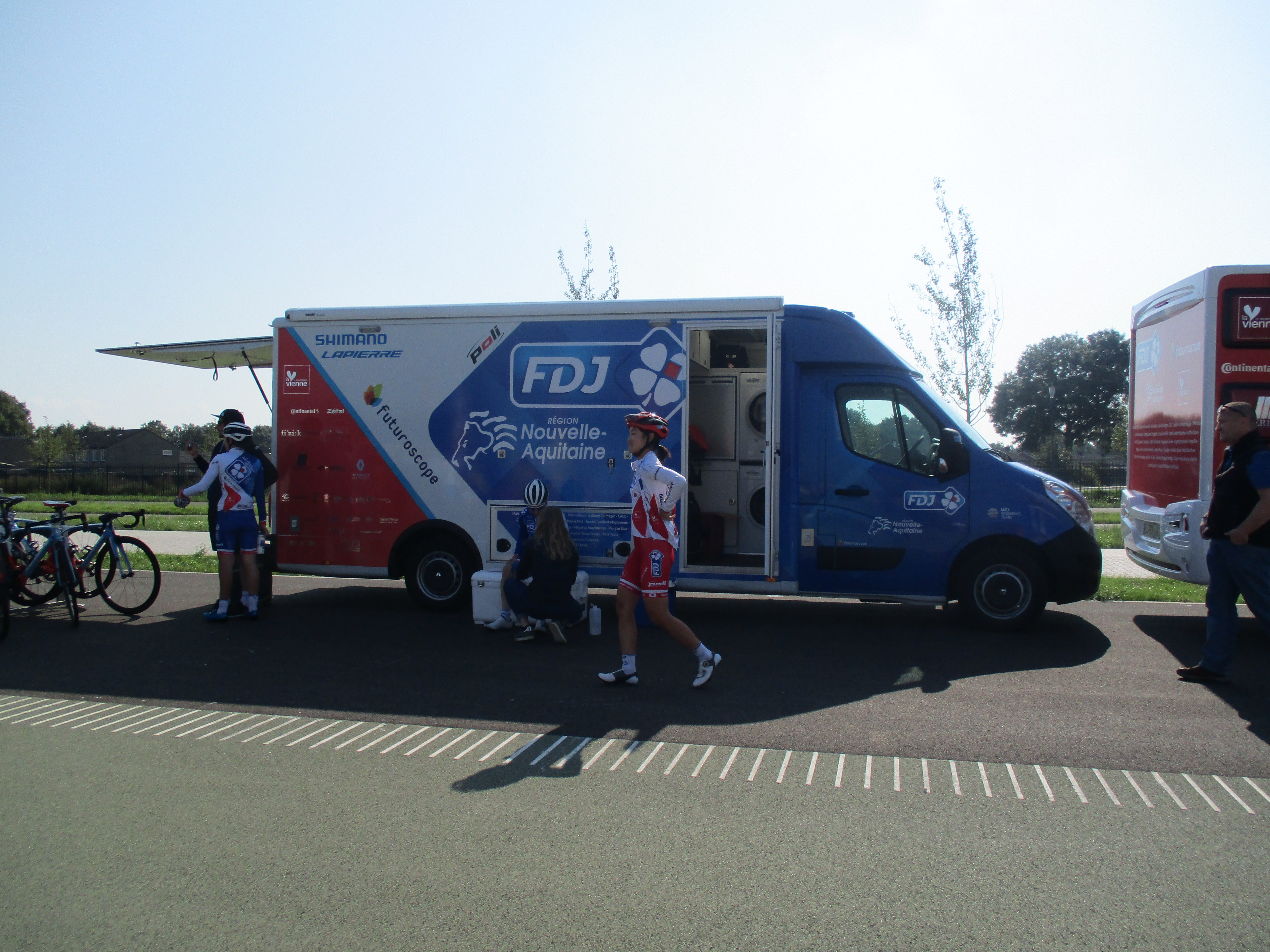 Start van de 6e etappe van de Boels Ladies Tour 2017 op het Tom Dumoulin Bike Park in Sittard-Geleen.